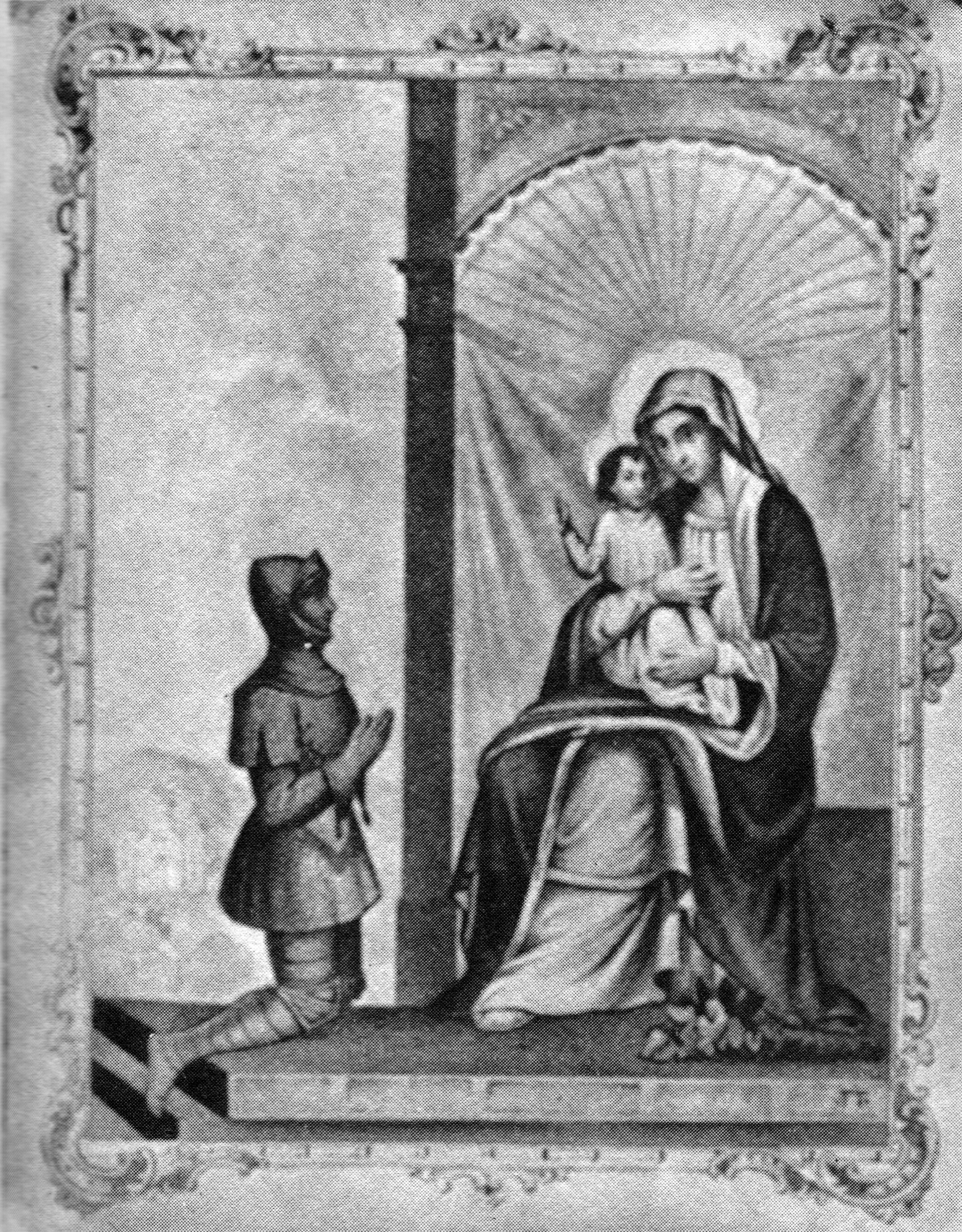 Immagine Beata Vergine del Castello di Fiorano